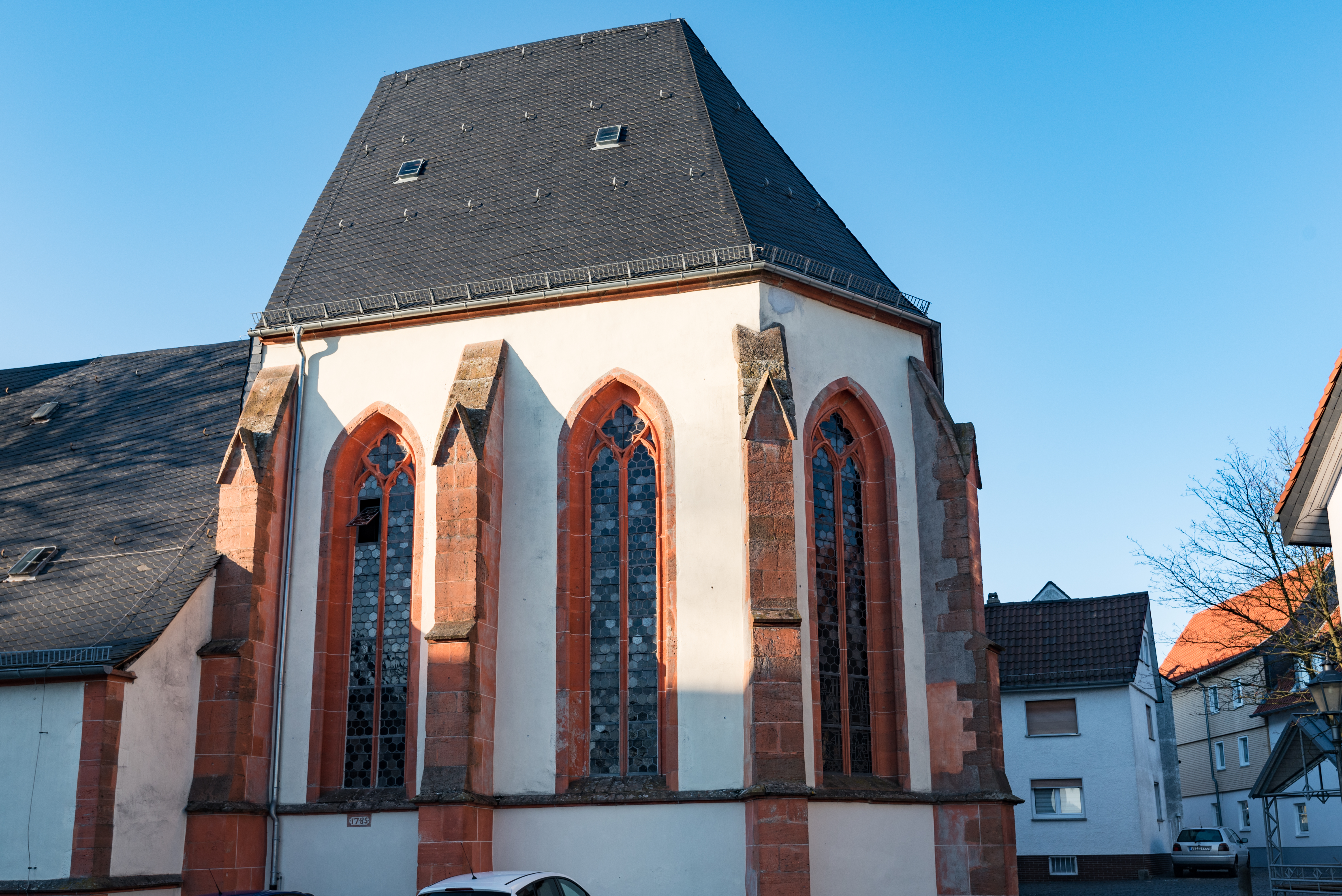 Homberg (Ohm), An der Stadtkirche 11, Ev. Stadtkirche